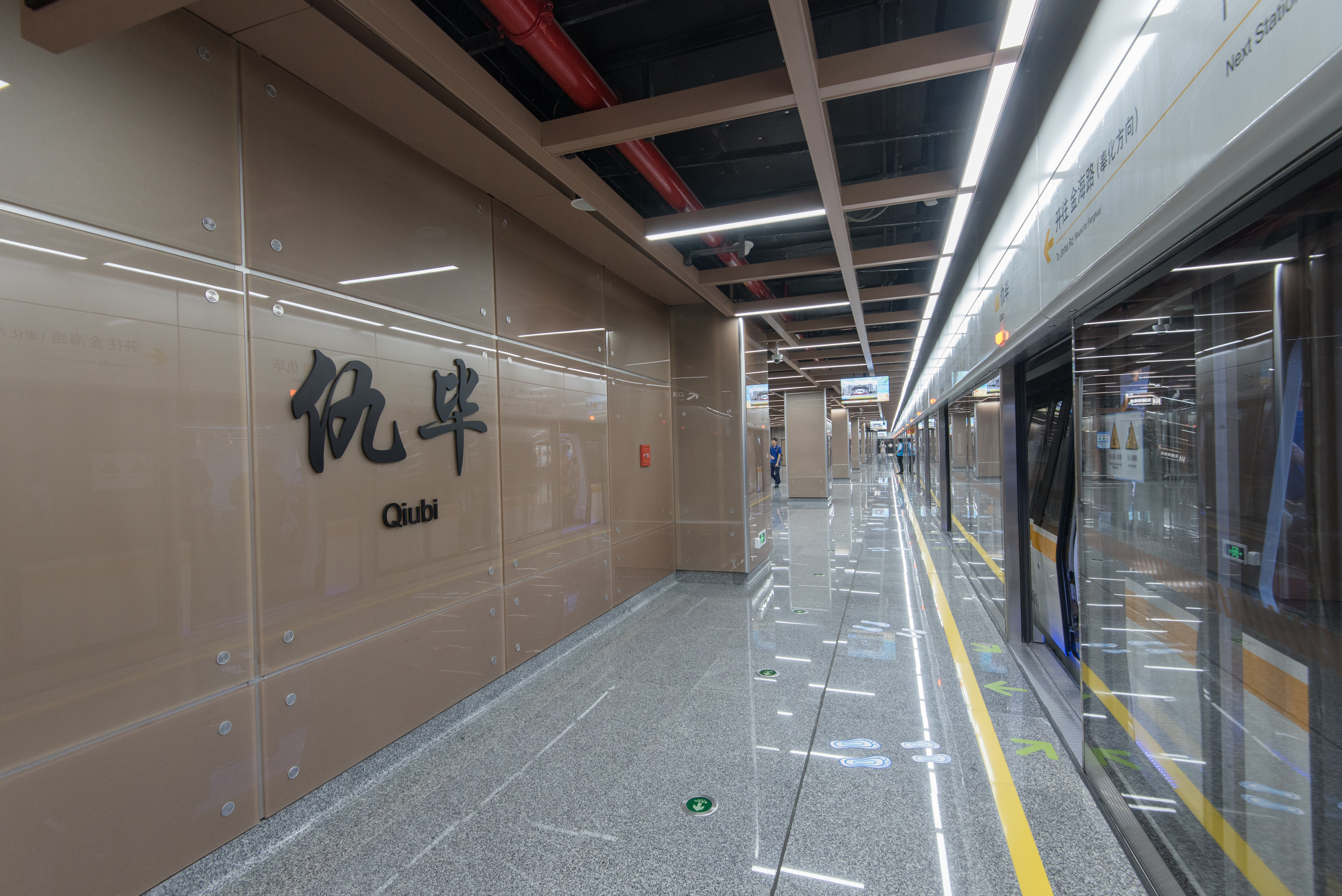 宁波地铁仇毕站